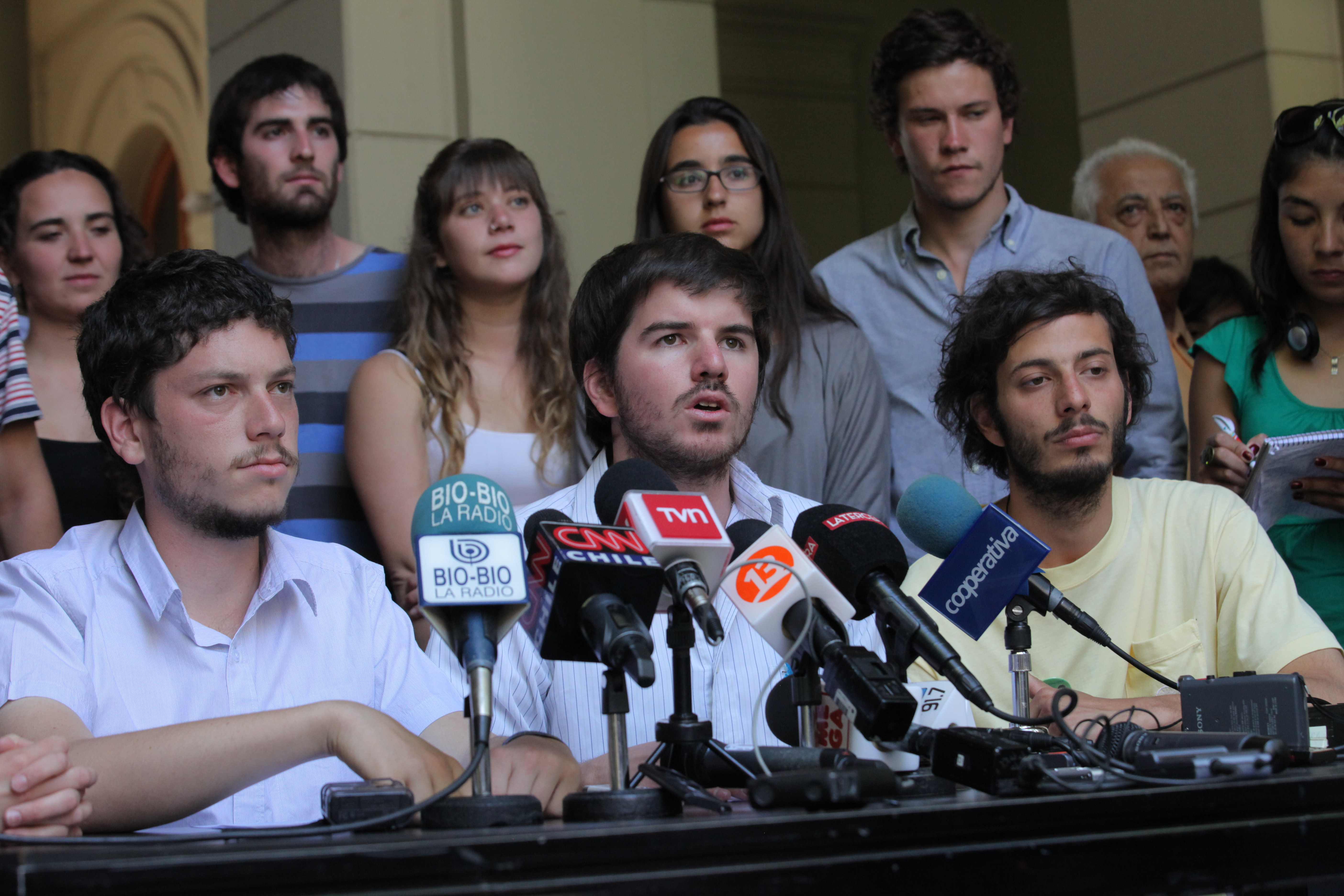 Noam Titelman, presidente electo de la FEUC; Giorgio Jackson, presidente de la FEUC; y Rodrigo Echecopar, primer vicepresidente electo de la FEUC.